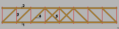 Howe Holz Fachwerk Brücke